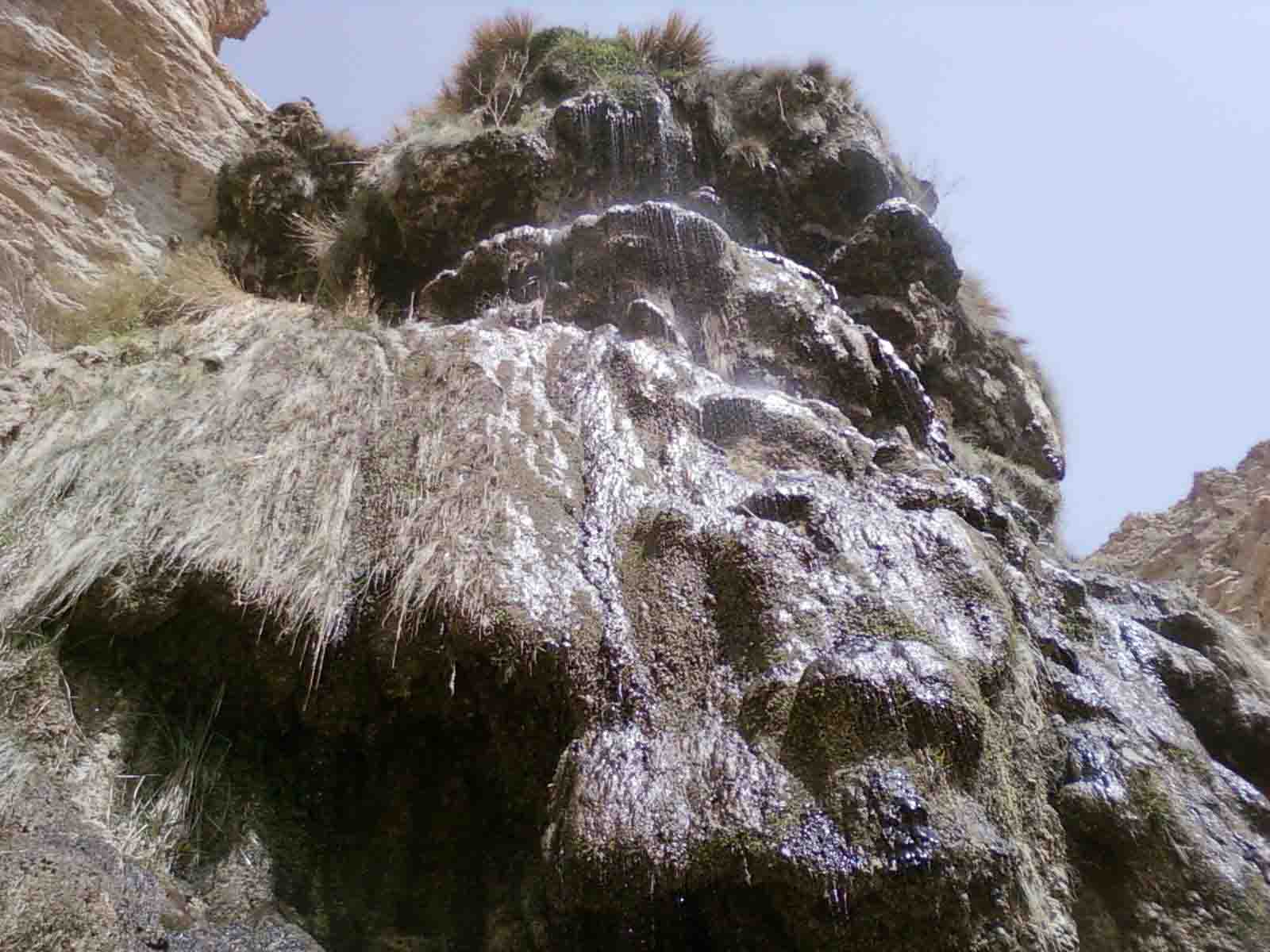 منطقه تفریحی رحمت آباد جویم-آبشار رحمت آباد